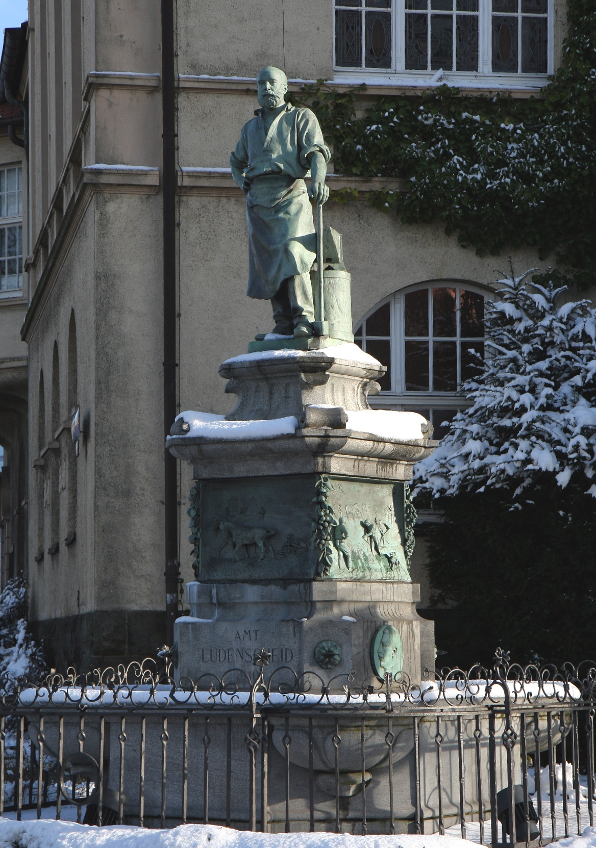 „Selve-Brunnen“ in Lüdenscheid. 1910 errichtet und seit 2. Juni 2003 unter Denkmalschutz gestellt.Widmungsinschrift:Fritz Selve Industriellergeboren in Peddensiepen am 20. Januar 1849seit 1874 Bürger von Italienwidmete diesen Monumentalbrunnenentworfen und angefertigt in Turin seinem Wohnsitzdem Amt Lüdenscheid